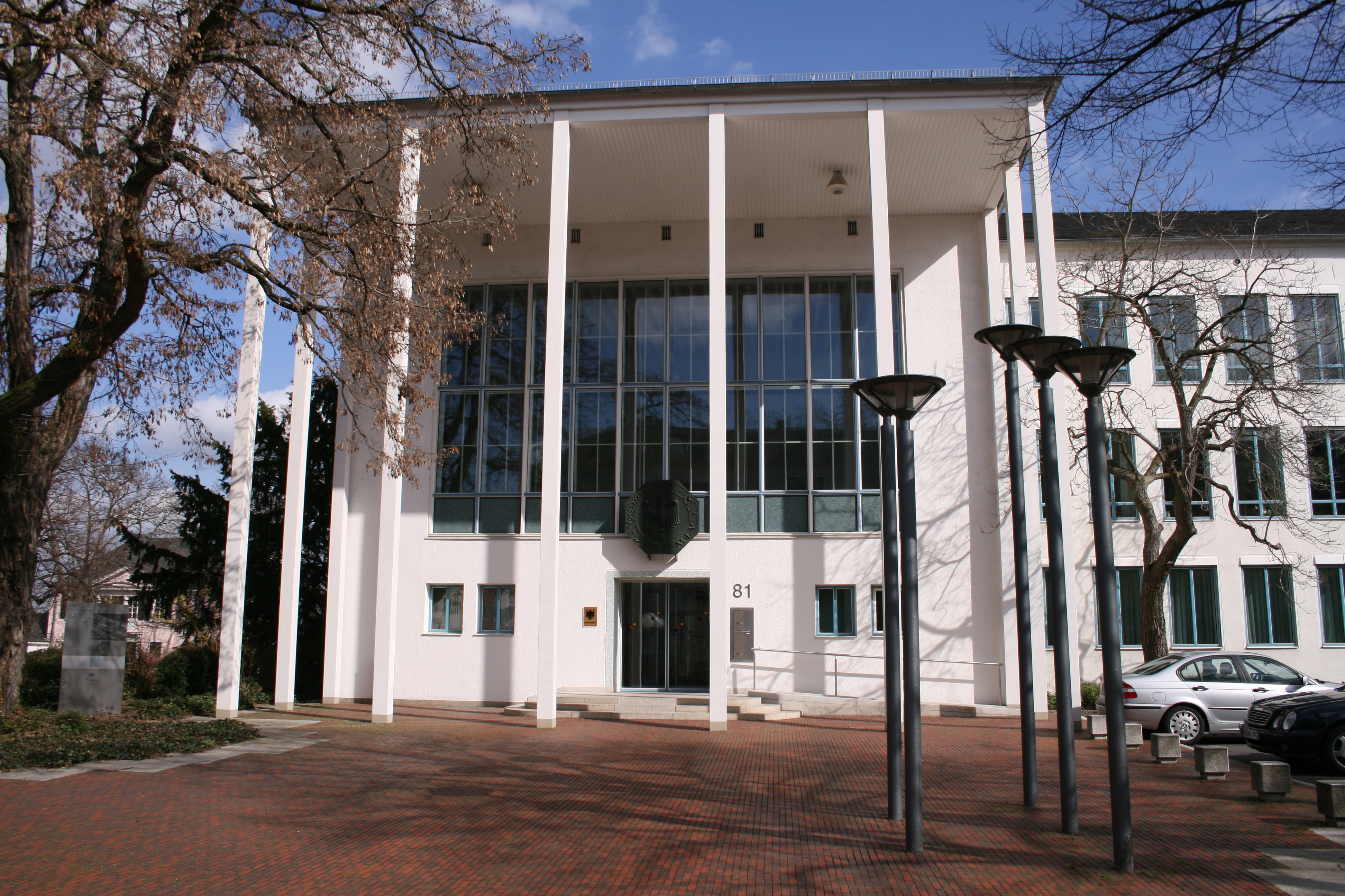 Eingang des Bundesrechnungshofs (Gebäude des ehem. Bundespostministeriums) in Bonn